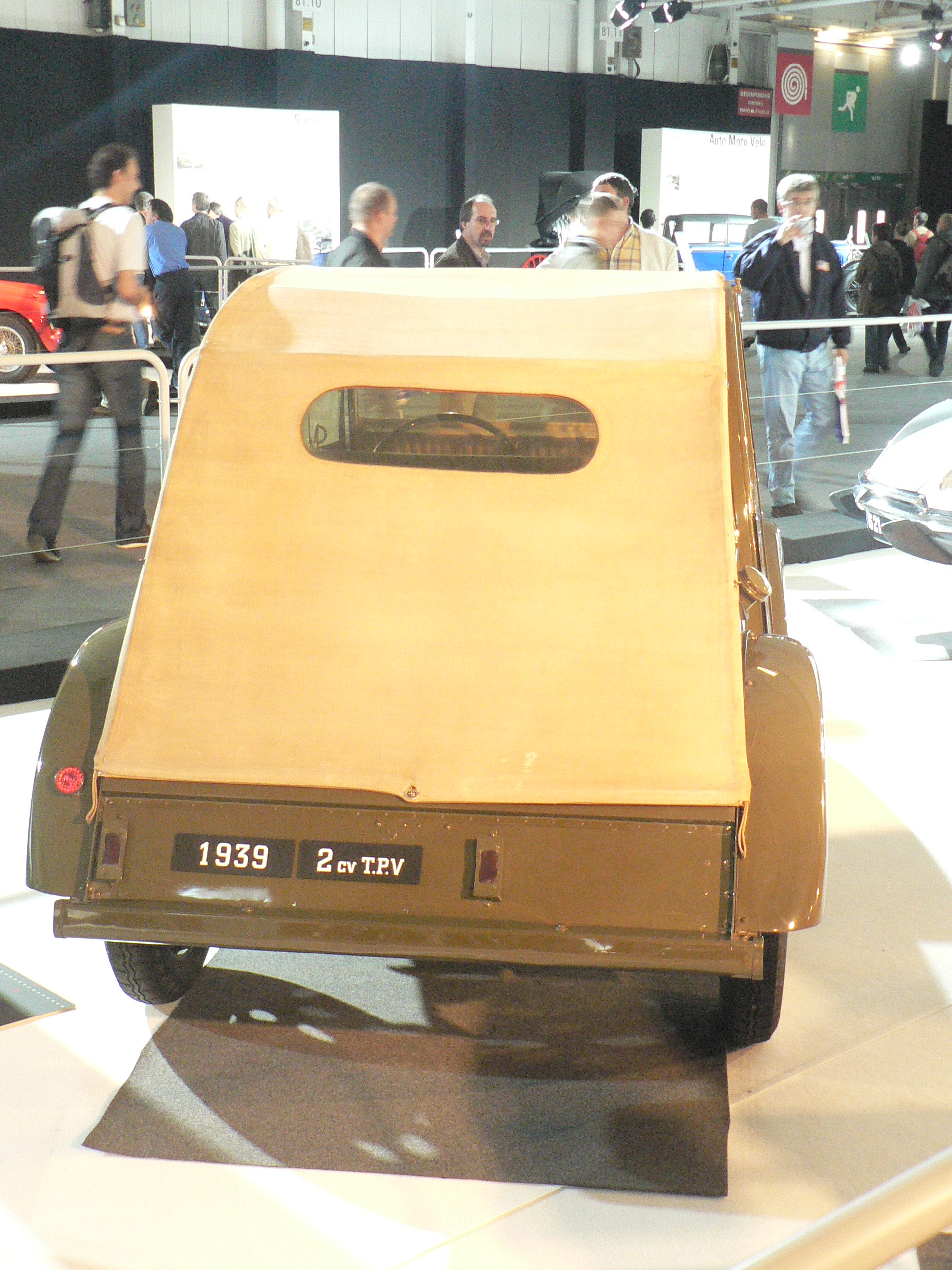 Mondial de l automobile de Paris (October 2006)